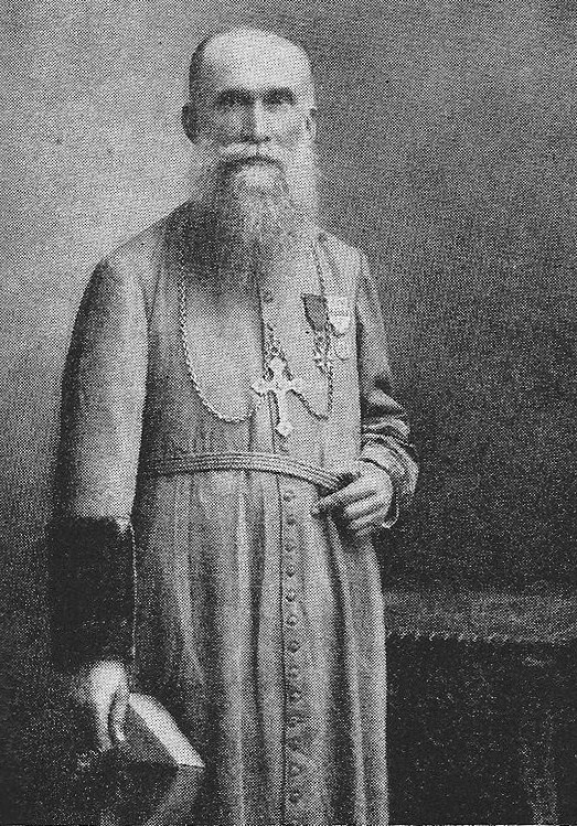 Monseigneur_Hyacinth Joseph Jalabert_.